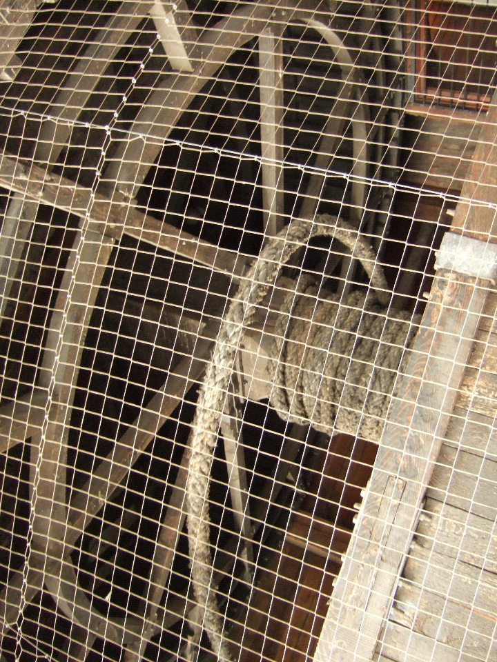 Danzig - Trommel im Krantor